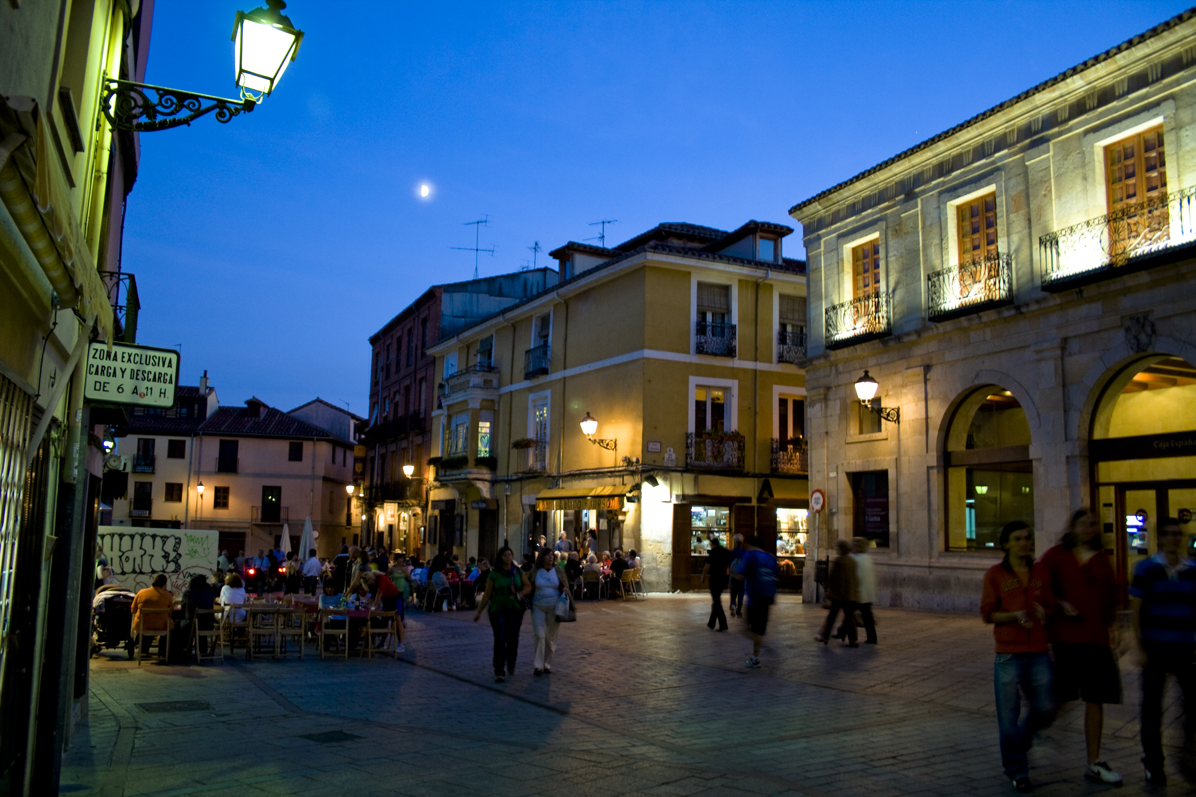 barrio Humedo